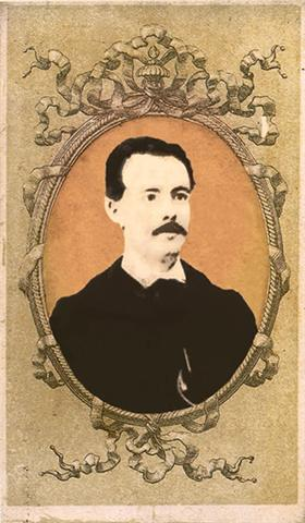 Imagen procesada y actualizada de una imagen de finales del XIX principios XX